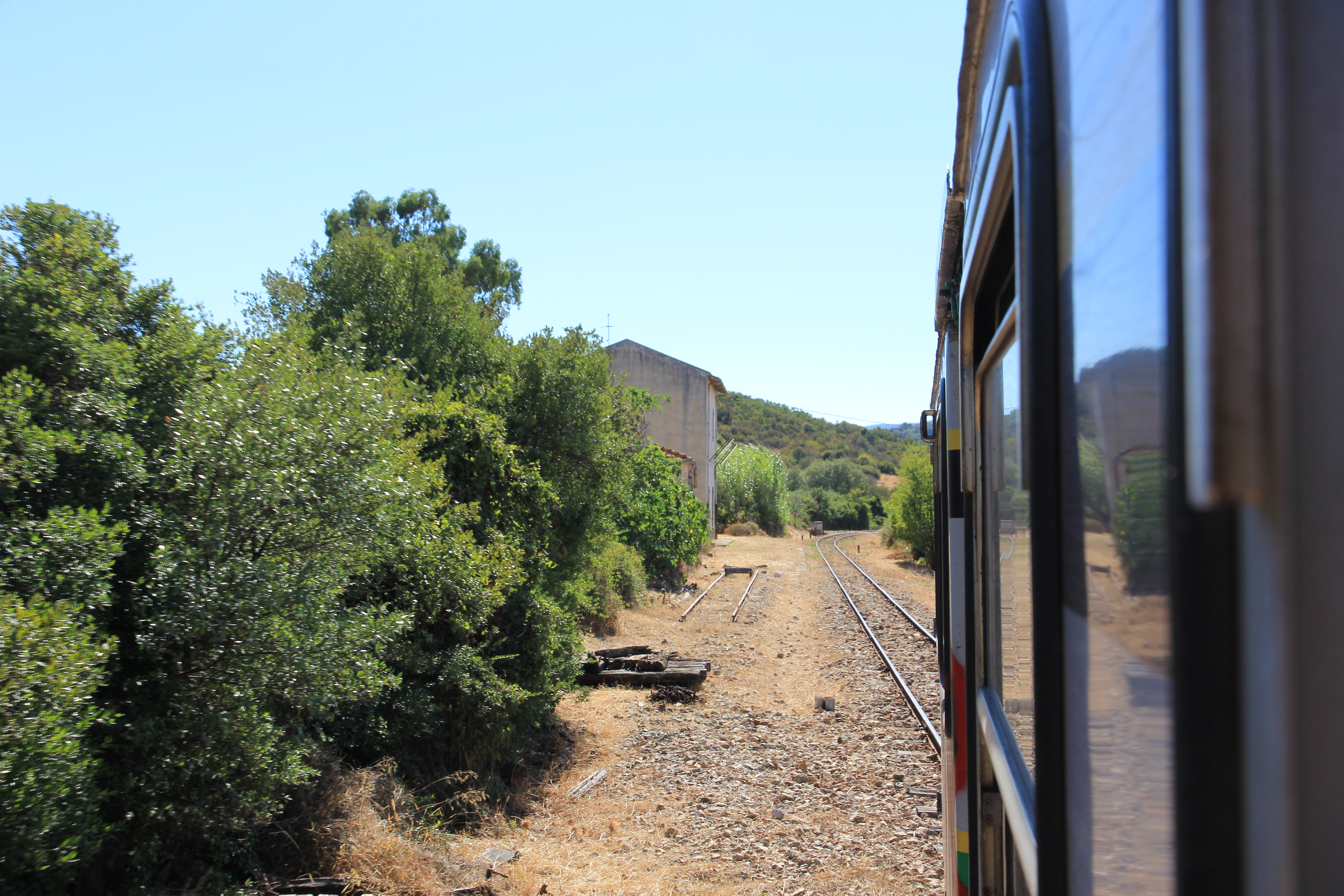 Arzachena, stazione ferroviaria di Oddastru